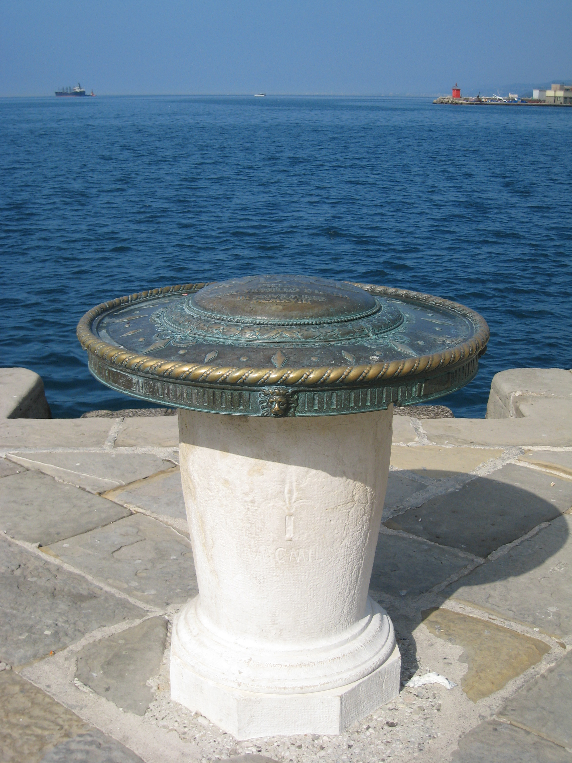 La rosa dei venti in cima al Molo Audace - Trieste - Italy